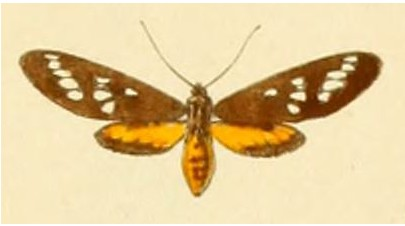 Maculonaclia florida (de Joannis, 1906)